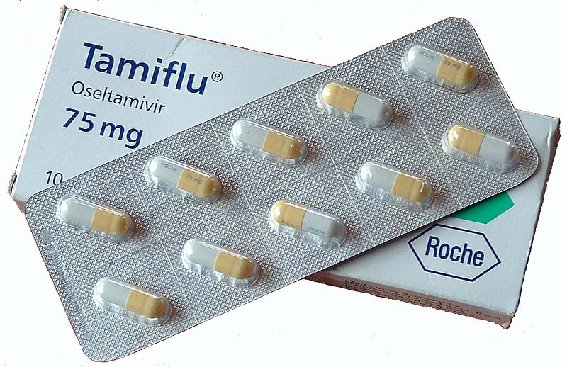 Tamiflu